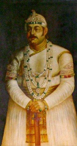 Afzal ud-Daula